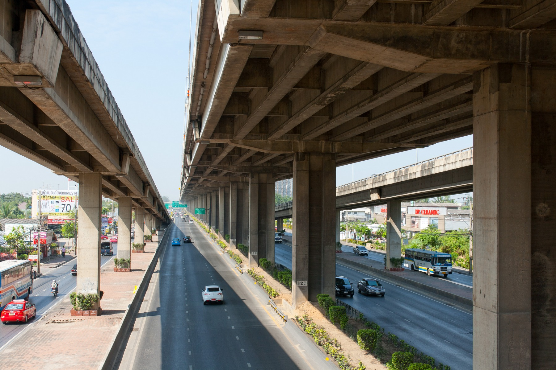 Chim Phli, Taling Chan, Bangkok 10170, Thailand